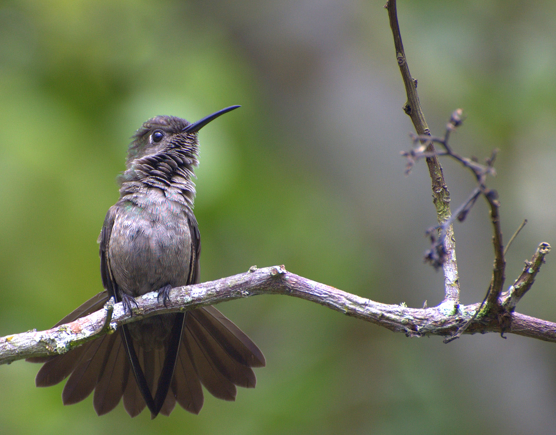 Vale do Ribeira - Registro-SP